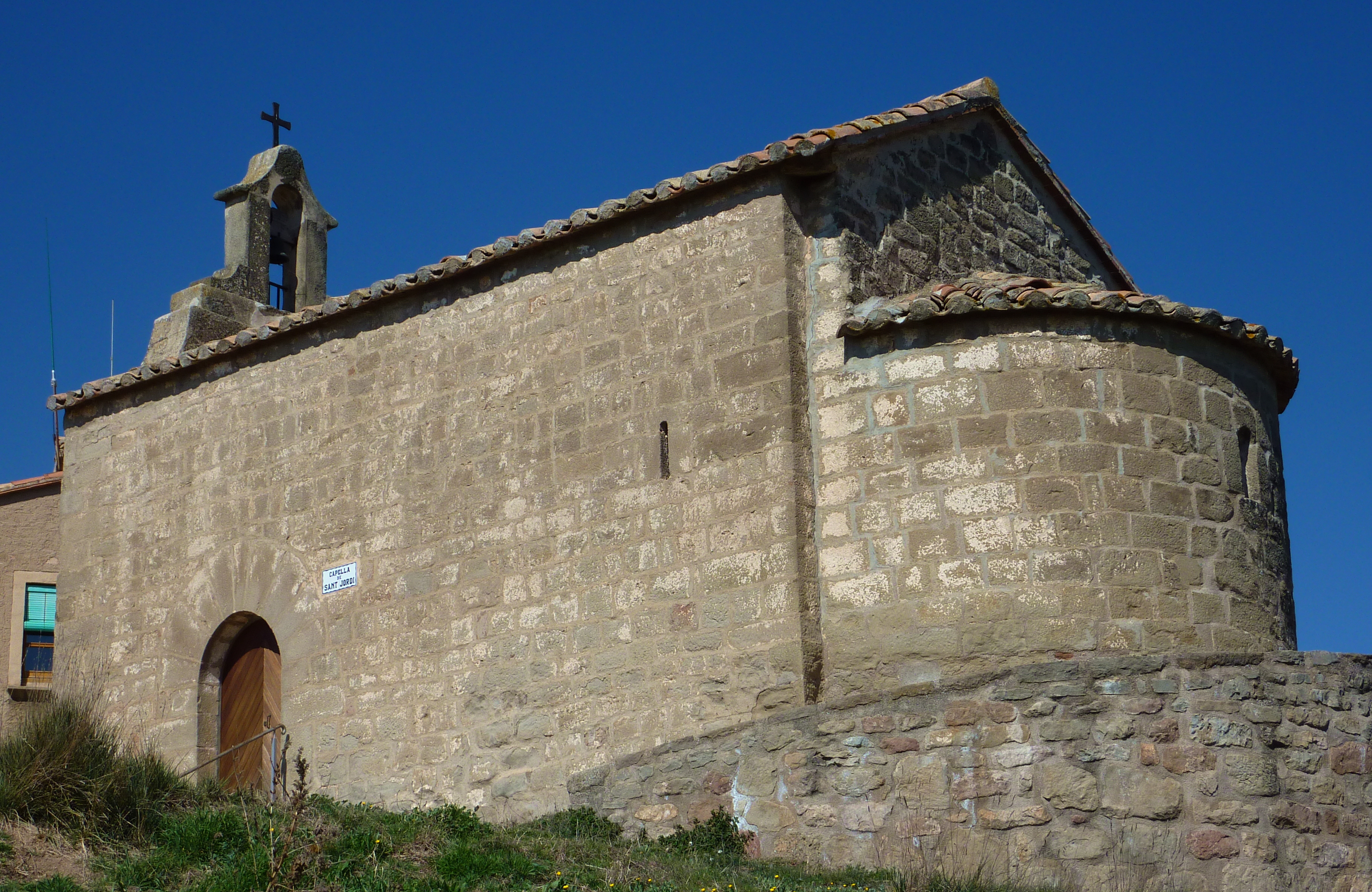 Església de Sant Jordi de Lloberes (Gaià)